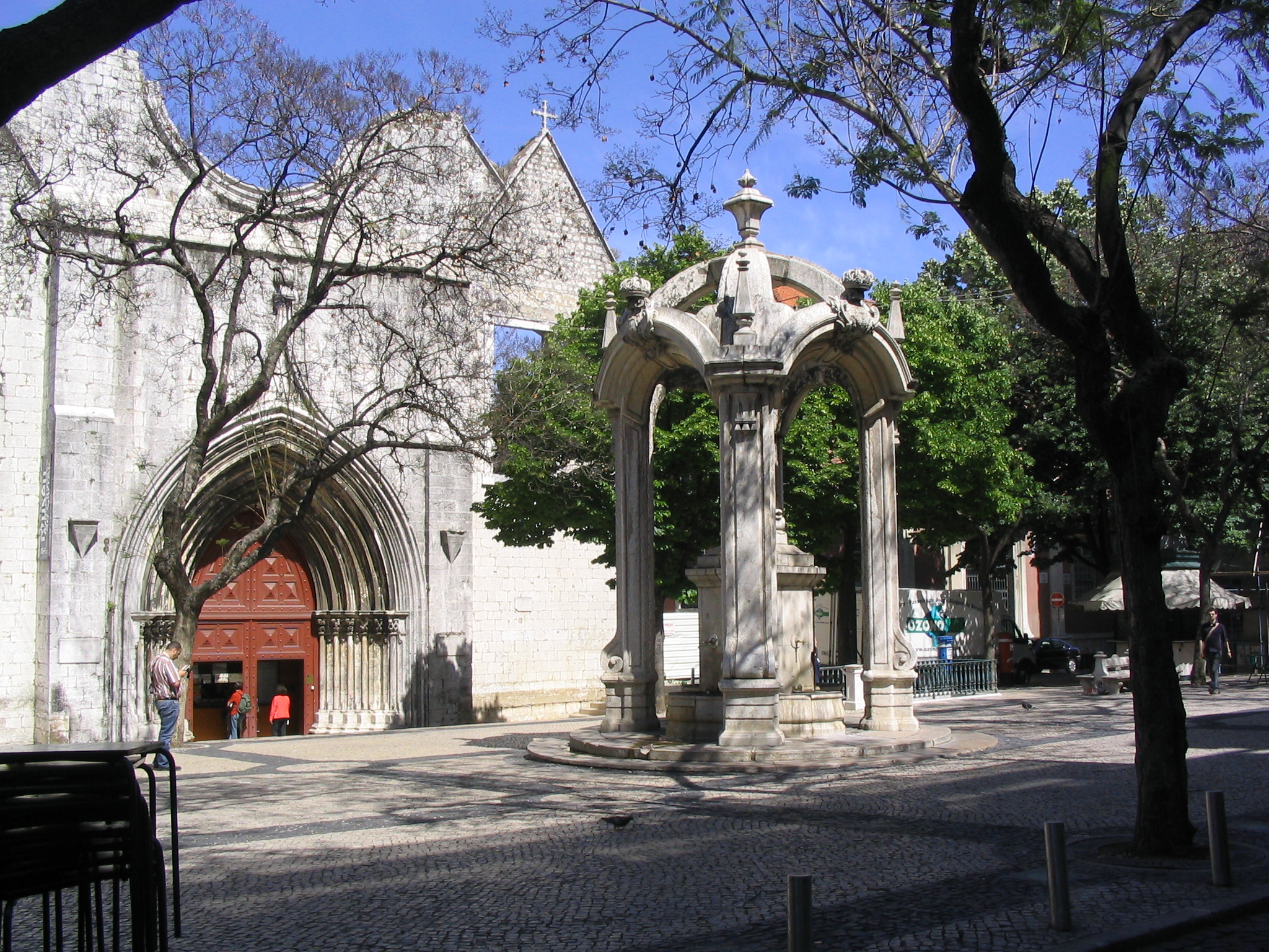 Carmo Square (Largo do Carmo) in Lisbon, Portugal